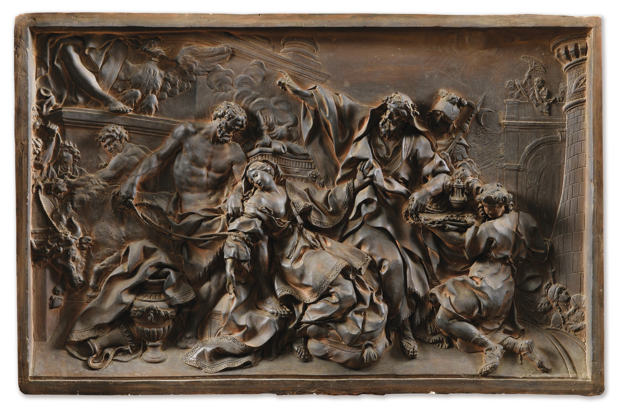 modello du Martyre de sainte Victoire, Versailles, chapelle royale